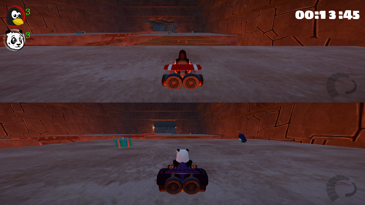 Écran multijoueur local (sur une même machine) de SuperTuxKart, version 0.9.1. On peut jouer avec 4 personnes au maximum.